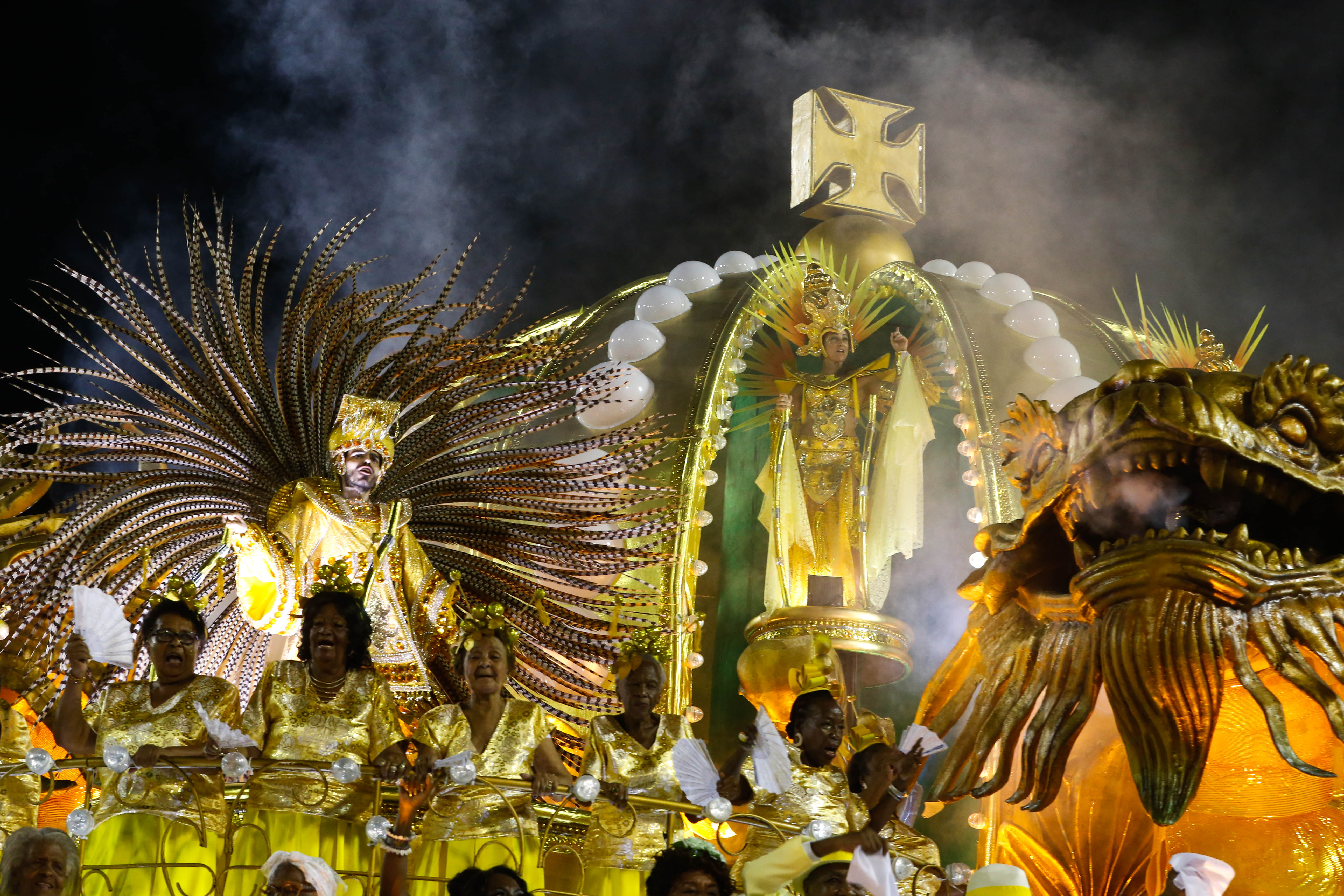 Rio de Janeiro - A Império Serrano abre o primeiro dia de desfiles do Grupo Especial das Escolas de Samba do Rio, na Sapucaí (Tânia Rêgo/Agência Brasil)